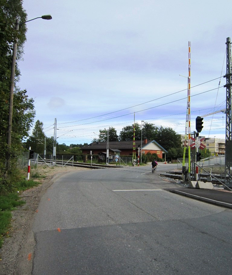 Fylkesvei 204 krysser Spikkestadlinjen på planovergang nordøst for Heggedal stasjon.